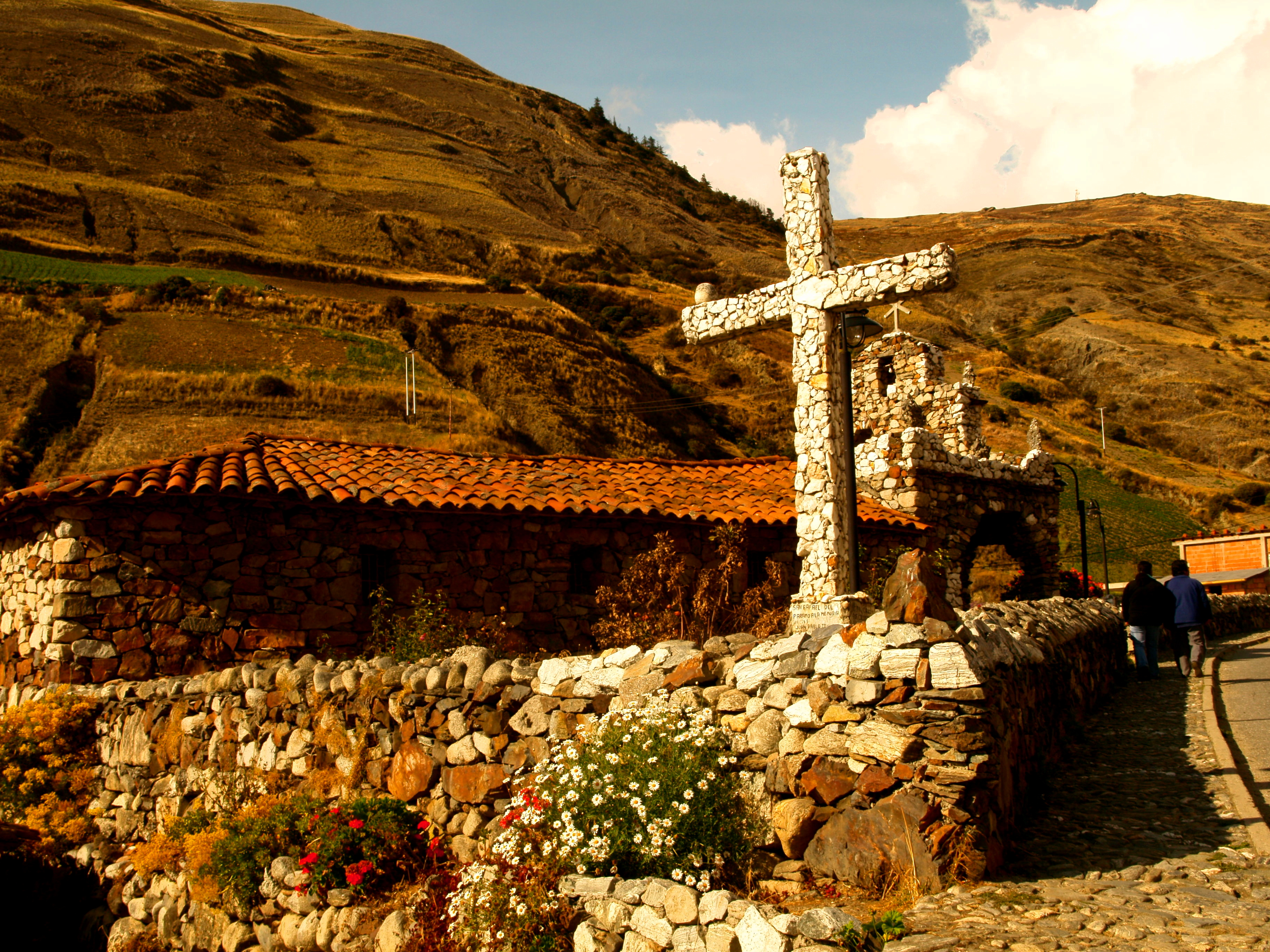 Fotografía: Jorge Paparoni